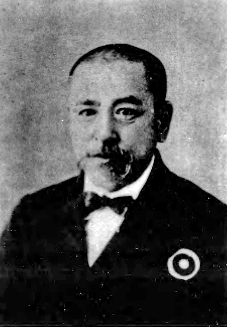 南方熊楠。御前進講の際の記念撮影。（昭和4年6月1日）